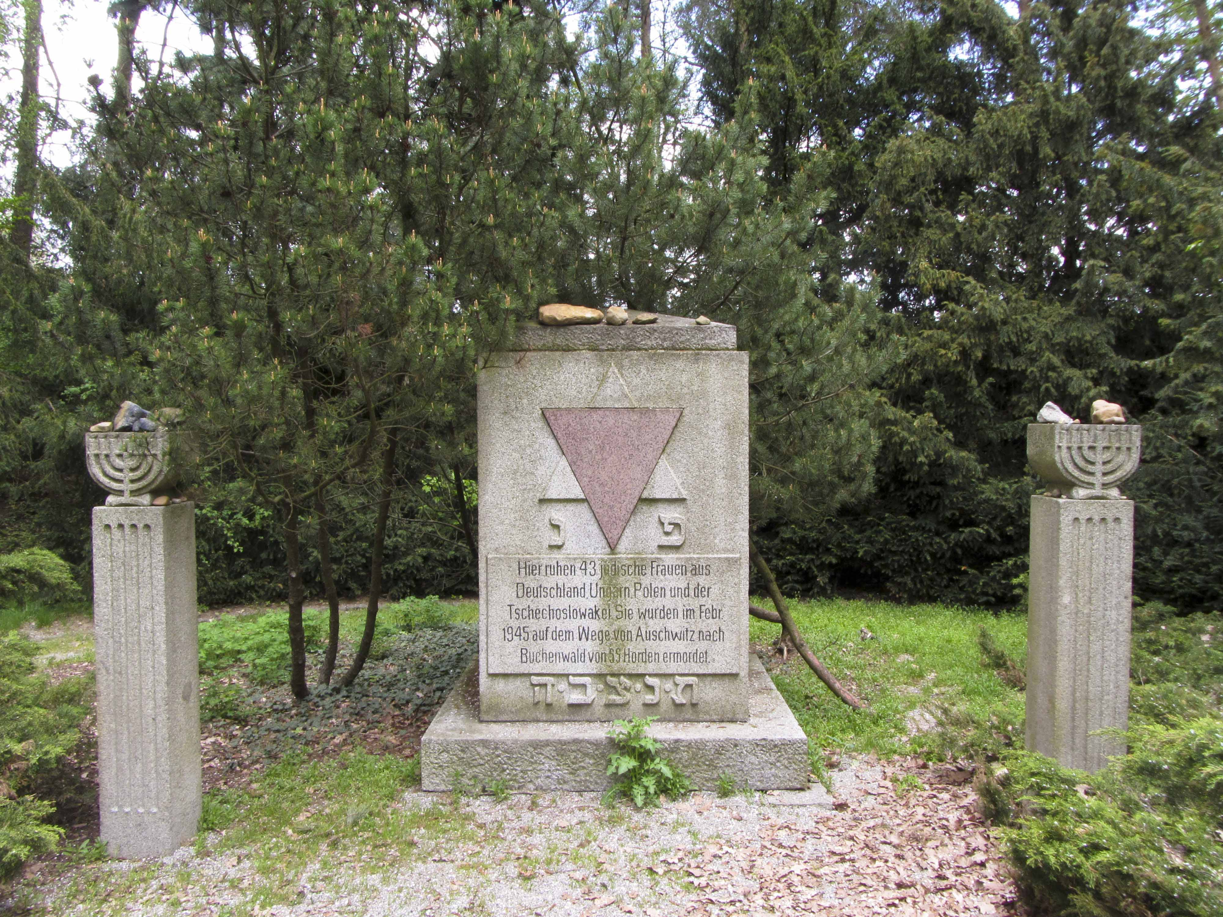 Gedenkstätte an den Todesmarsch von KZ- Häftlinge auf dem Wege von Auschwitz nach Buchenwald Hornjoserbsce: Wopomnišćo zamordowanym židowskim žonam na Tchórje w Słonej Boršći